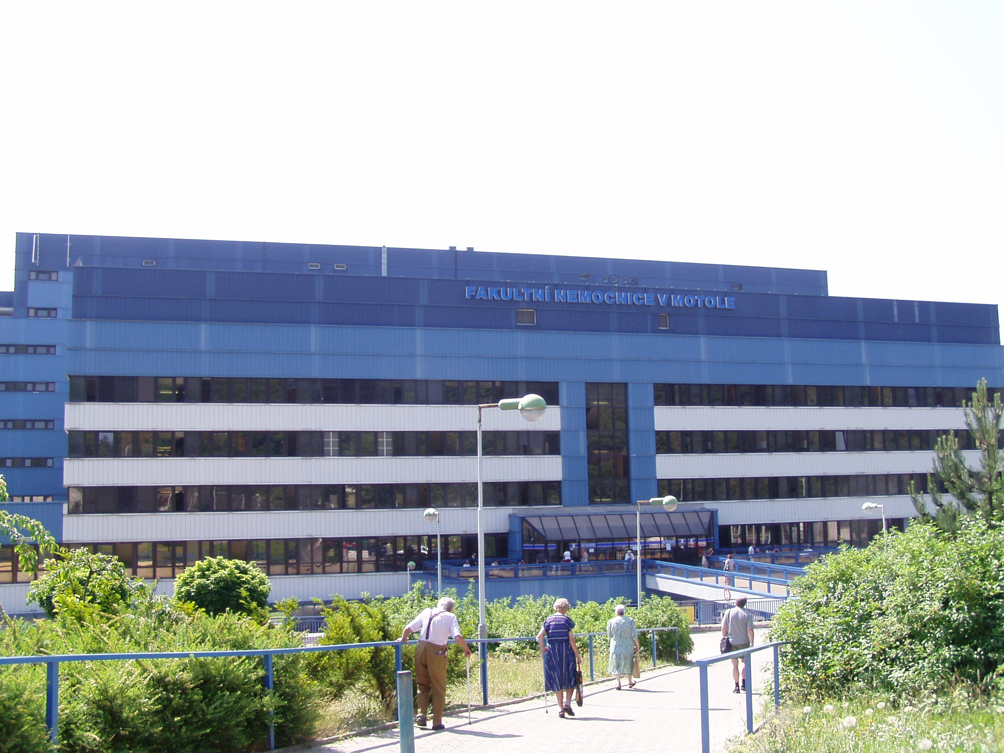 Fakultní nemocnice v Motole, část pro dospělé